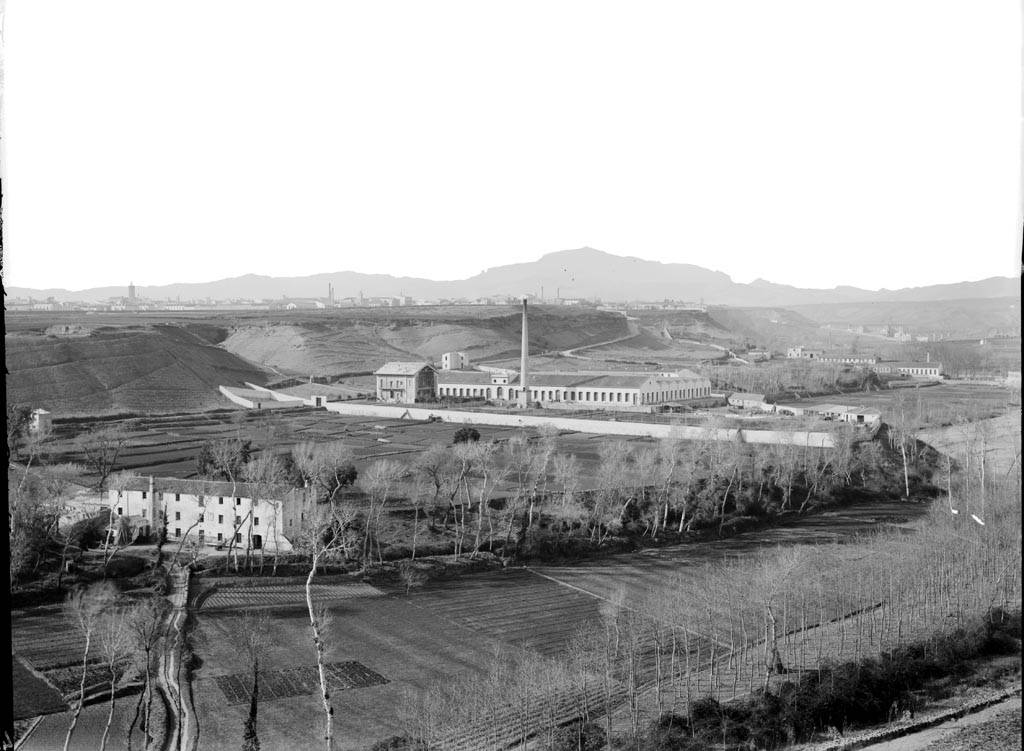 Imatge